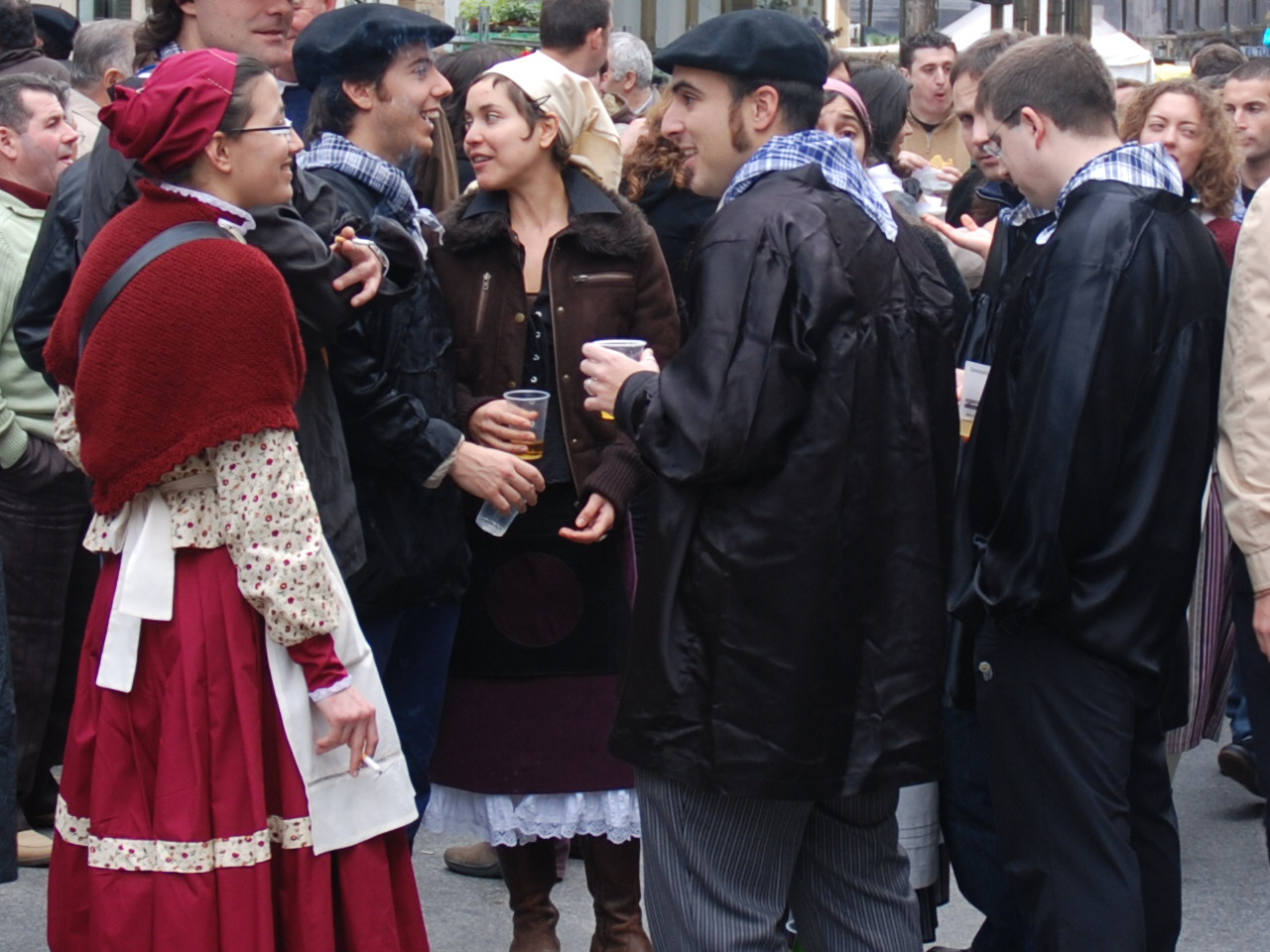 San Tomas jaia, Donostia, 2007